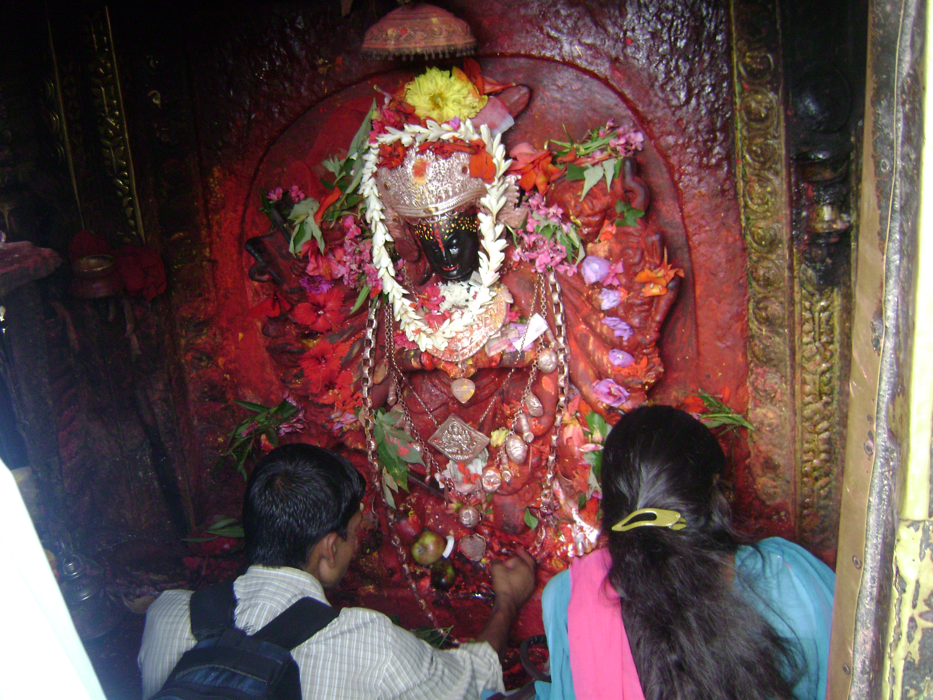 नेपाली: पलान्चोक भगवती